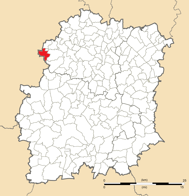 Carte de position de Pecqueuse en Essonne (91)